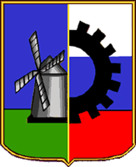 Герб Жердевского района, Тамбовская область